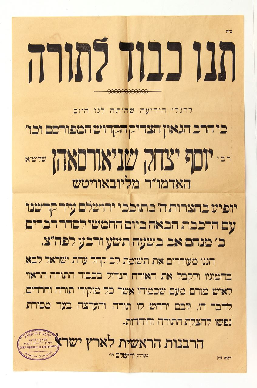 מודעה של הרבנות הראשית לארץ ישראל לכבוד ביקורו של אדמו"ר הריי"צ בשנת תרפ"ח-1928